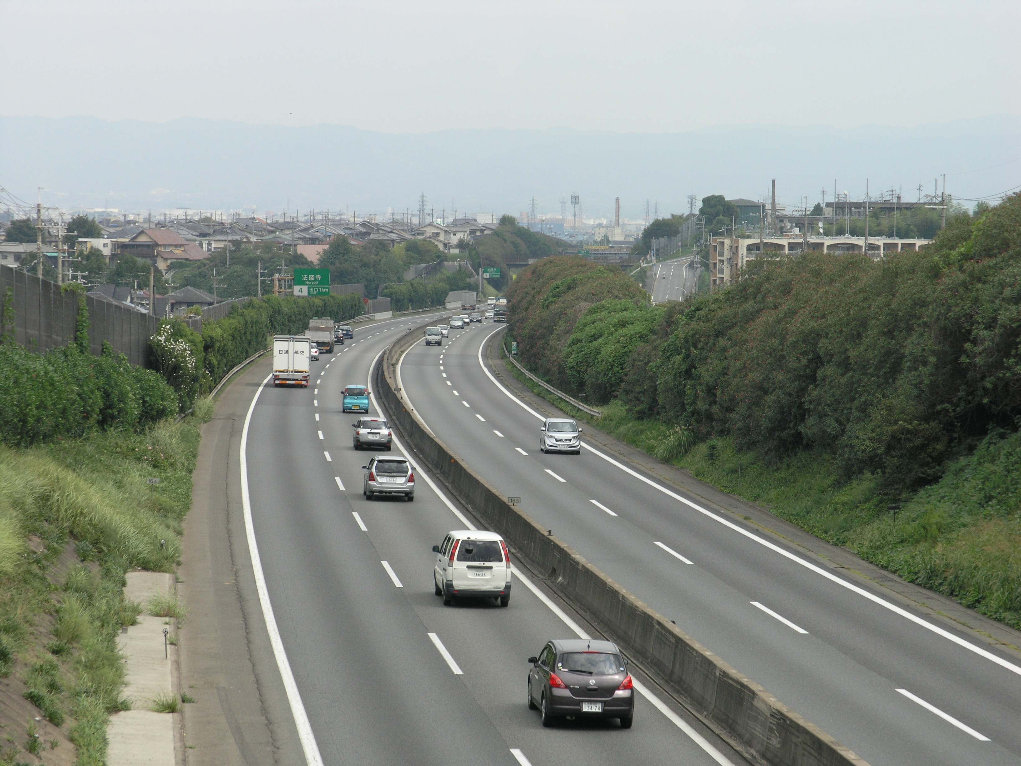 西名阪自動車道 (奈良県河合町) 2008年9月撮影。 機材：C8080WZ 撮影者：Kansai explorer